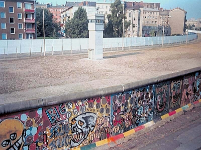 Blick aus dem Fenster des Badezimmer des Georg von Rauch-Haus, erster Stock. Bethaniendamm, Berlin Kreuzberg, 1986.